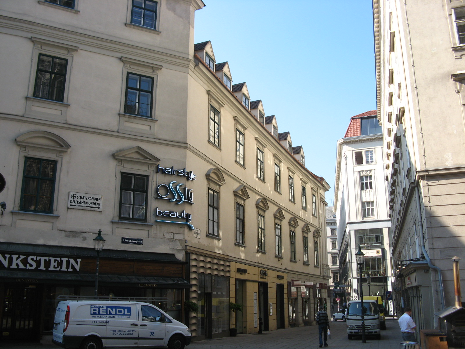 Churhausgasse vom Stephansplatz aus gesehen, Wien-Innere Stadt